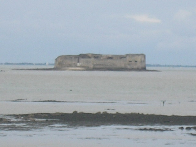 Fort Enet à Fouras